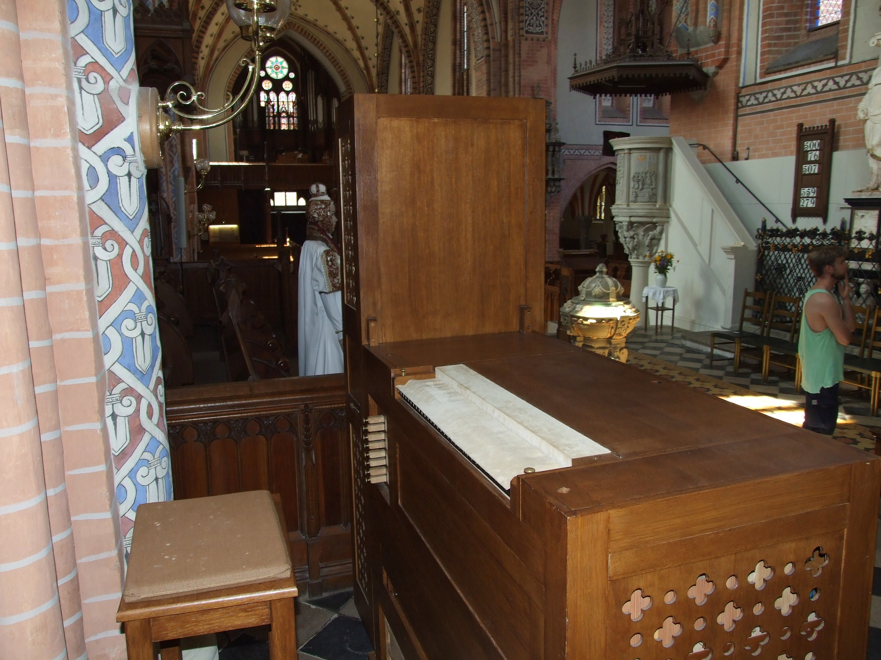 Orgelpositiv mit vier Registern von Michael Braun, Eisbergen aus dem Jahr 2006